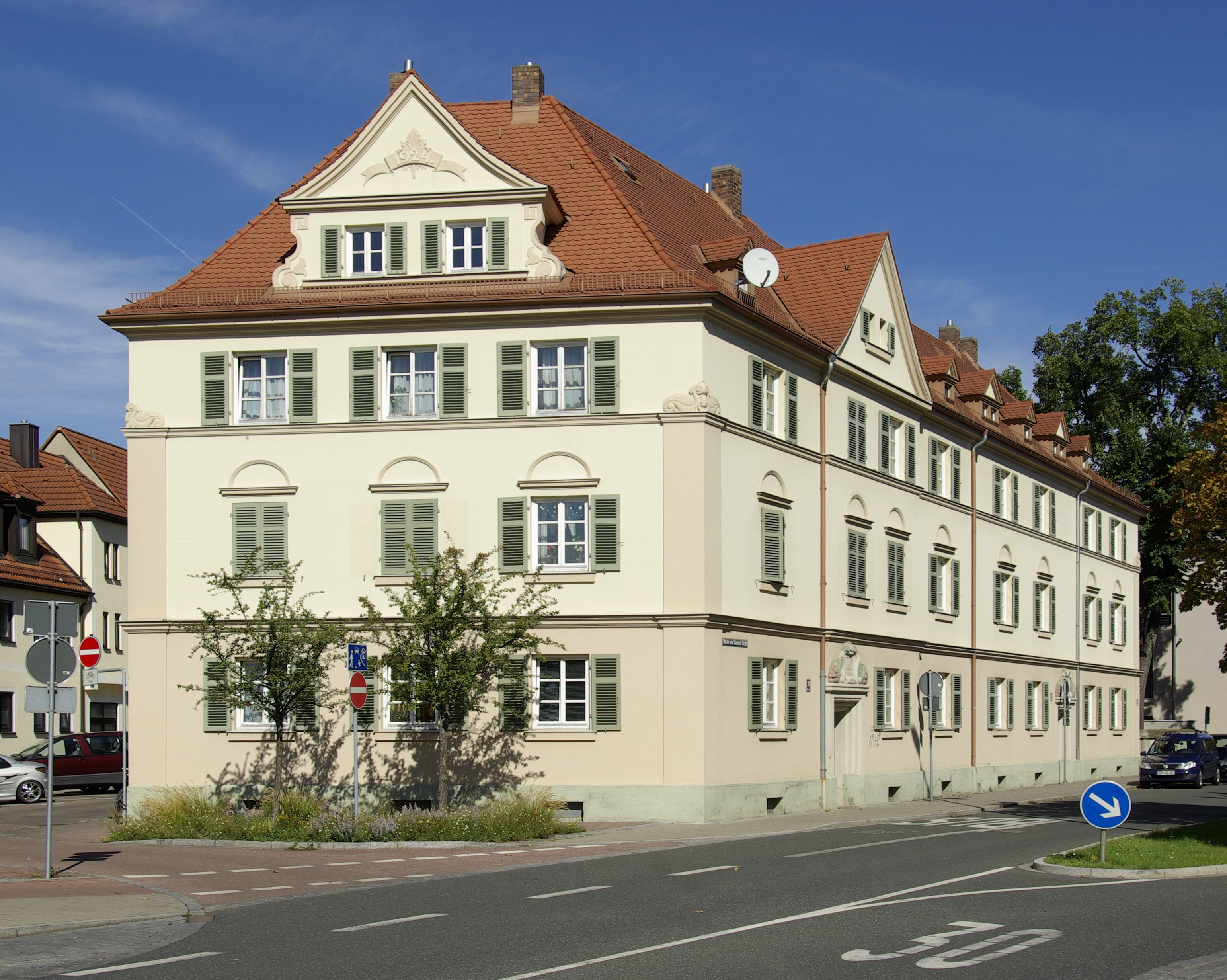 Wohnhaus Werner-von-Siemensstraße 24, 26, 28 / Stubenlohstraße in Erlangen